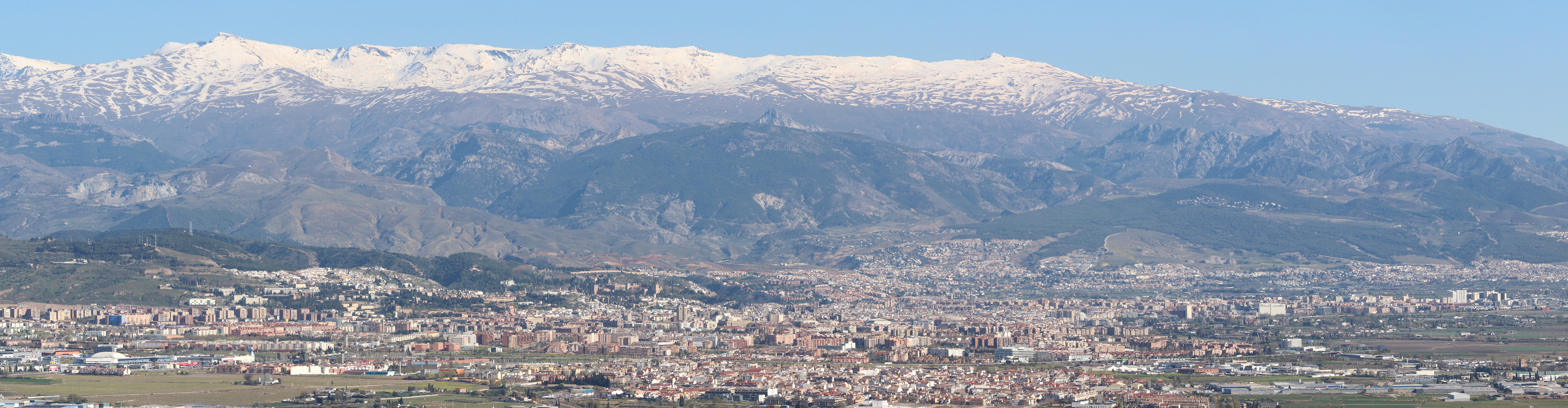 Panorámica amplia de Sierra Nevada y área metropolitana de Granada, 1 de abril de 2017